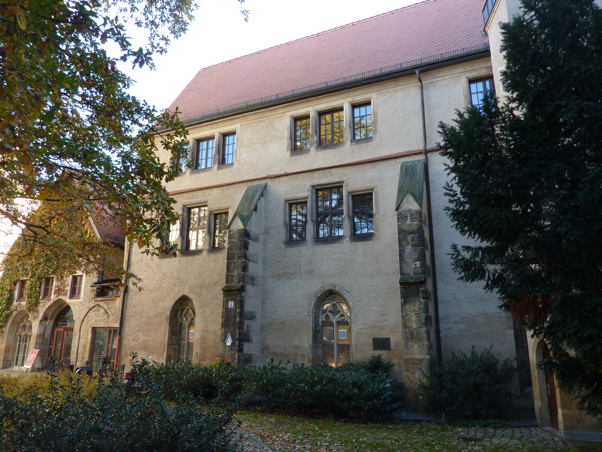 Klosterkirche St. Heinrich, Pirna)